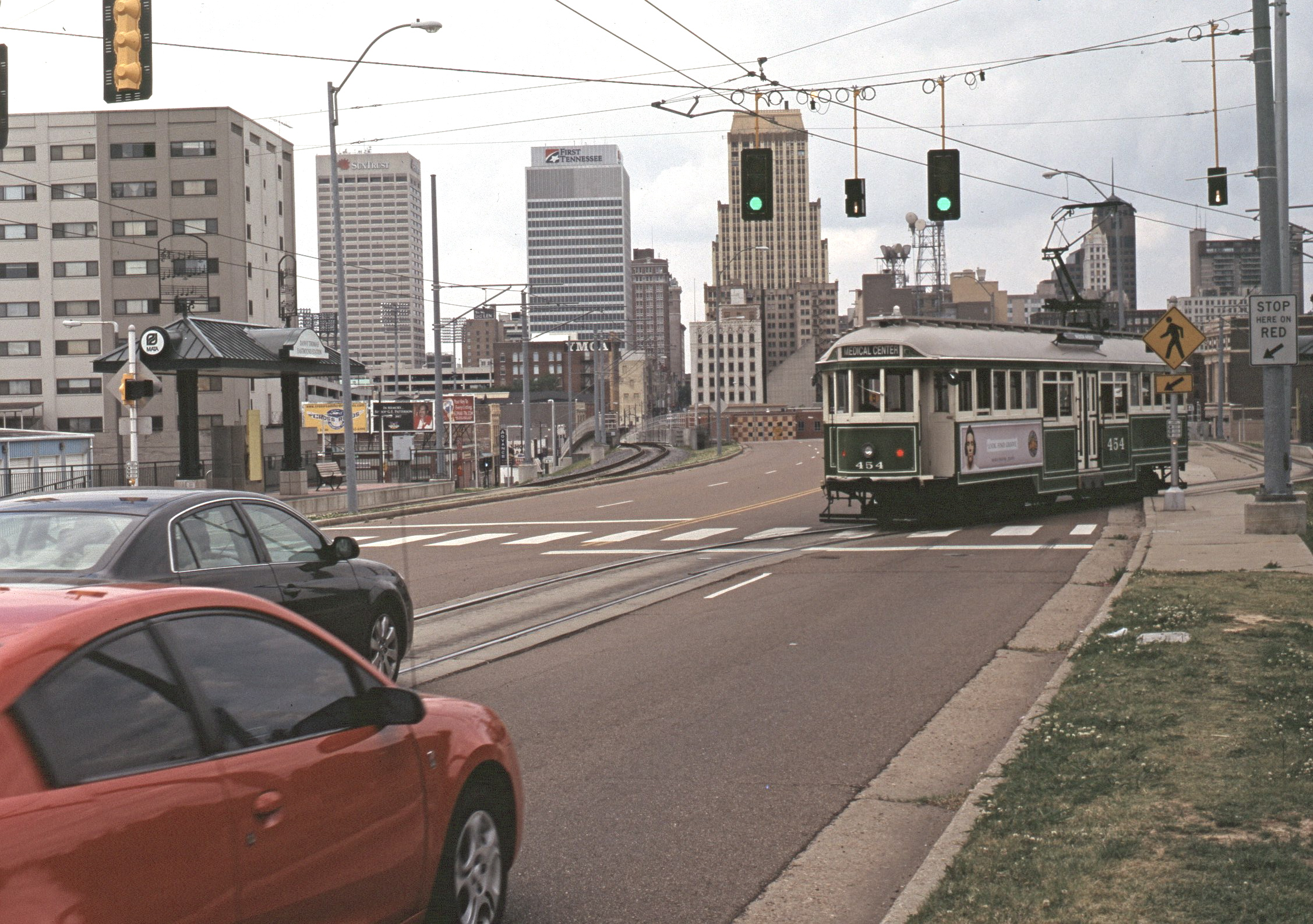 Memphis Station Danny Tomas Boulevard